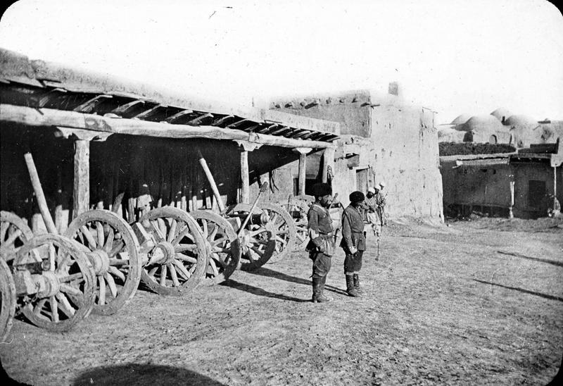 Бухарская артиллерия